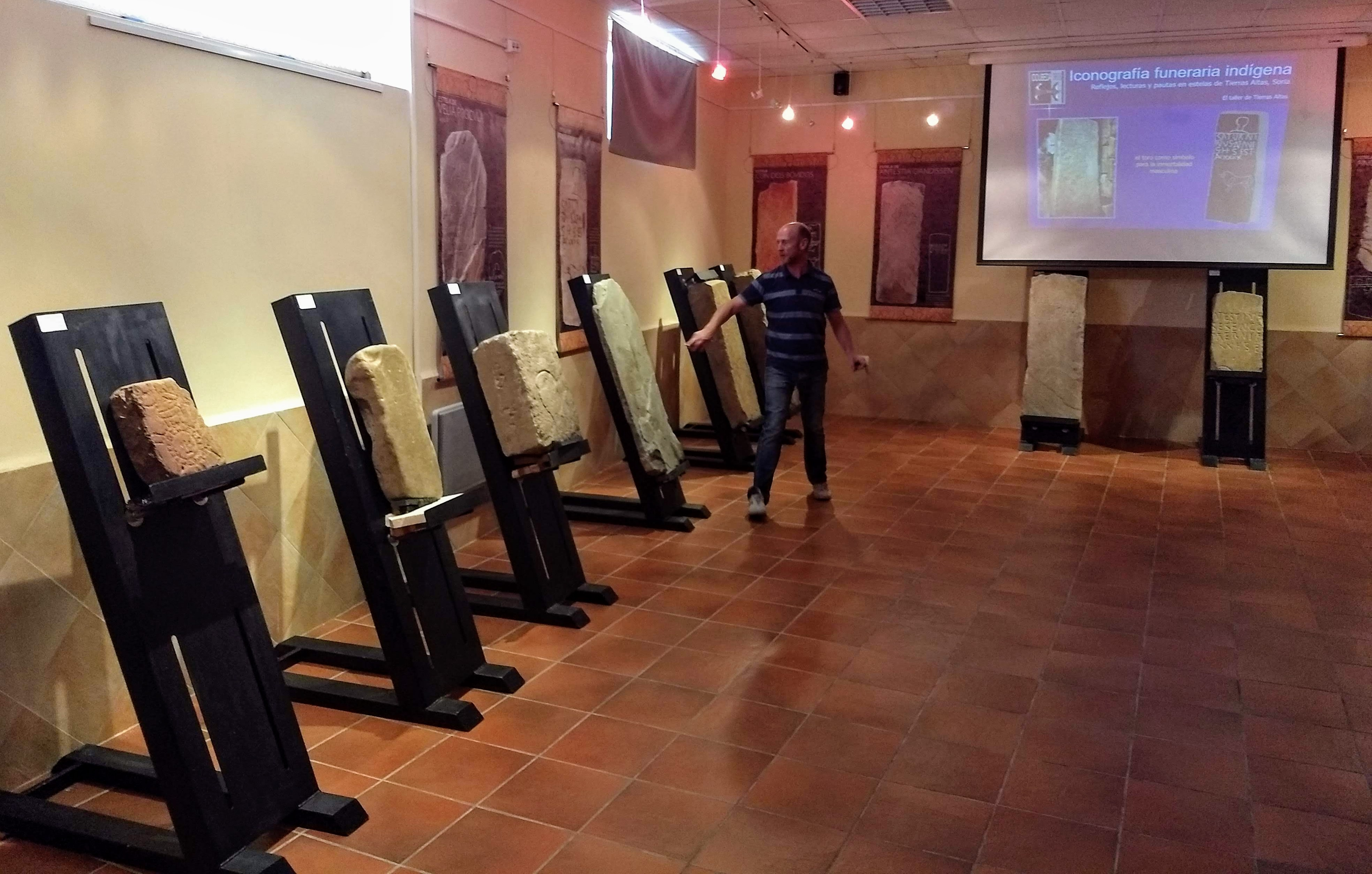 El arqueólogo Eduardo Alfaro, explicando las estelas funerarias romanas en Santa Cruz de Yanguas, Soria.